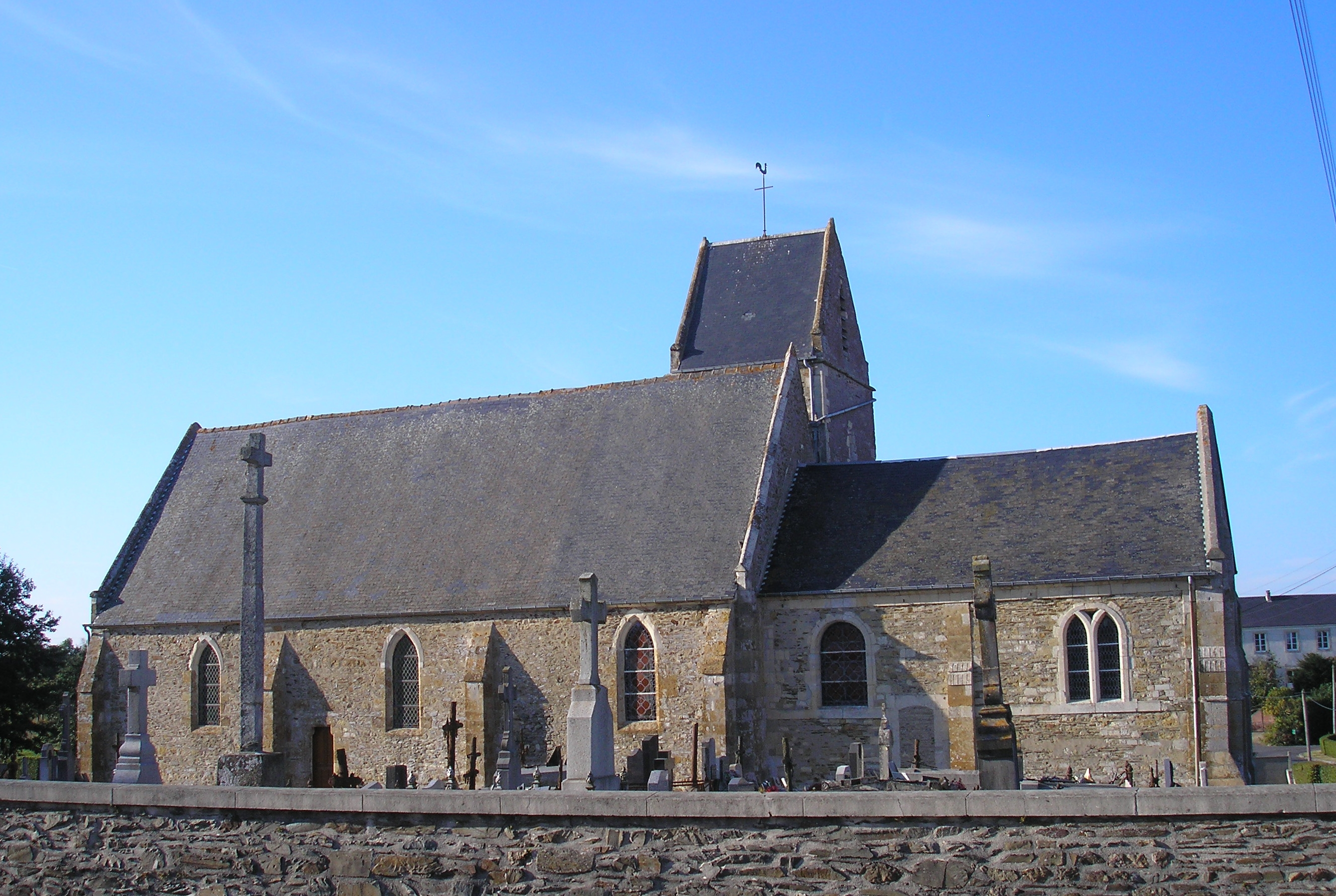 Courvaudon (Normandie, France). L'église Saint-Martin.